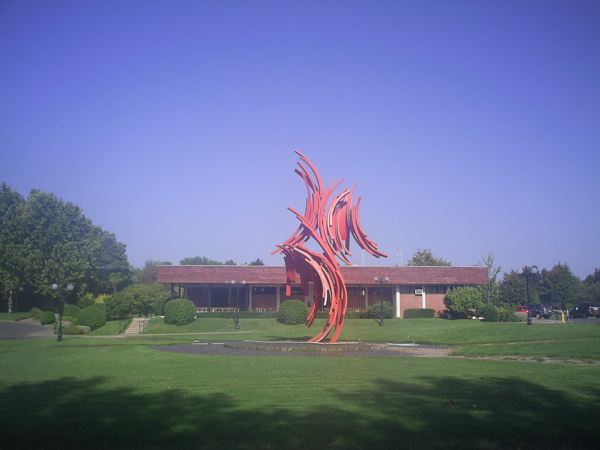 Escultura Trueno de la Universidad de Talca.